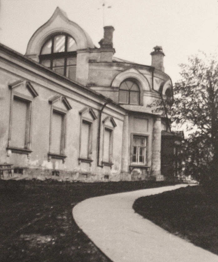 Дом-мастерскую Исааку Ильичу Левитану подарил Сергей Морозов, выходец из семьи меценатов, большой почитатель творчества Левитана и сам художник-любитель. С этим местом связано создание многих знаменитых полотен художника - "Вечер. Золотой Плес", "После дождя. Плес". Валентин Серов написал здесь портрет художника.